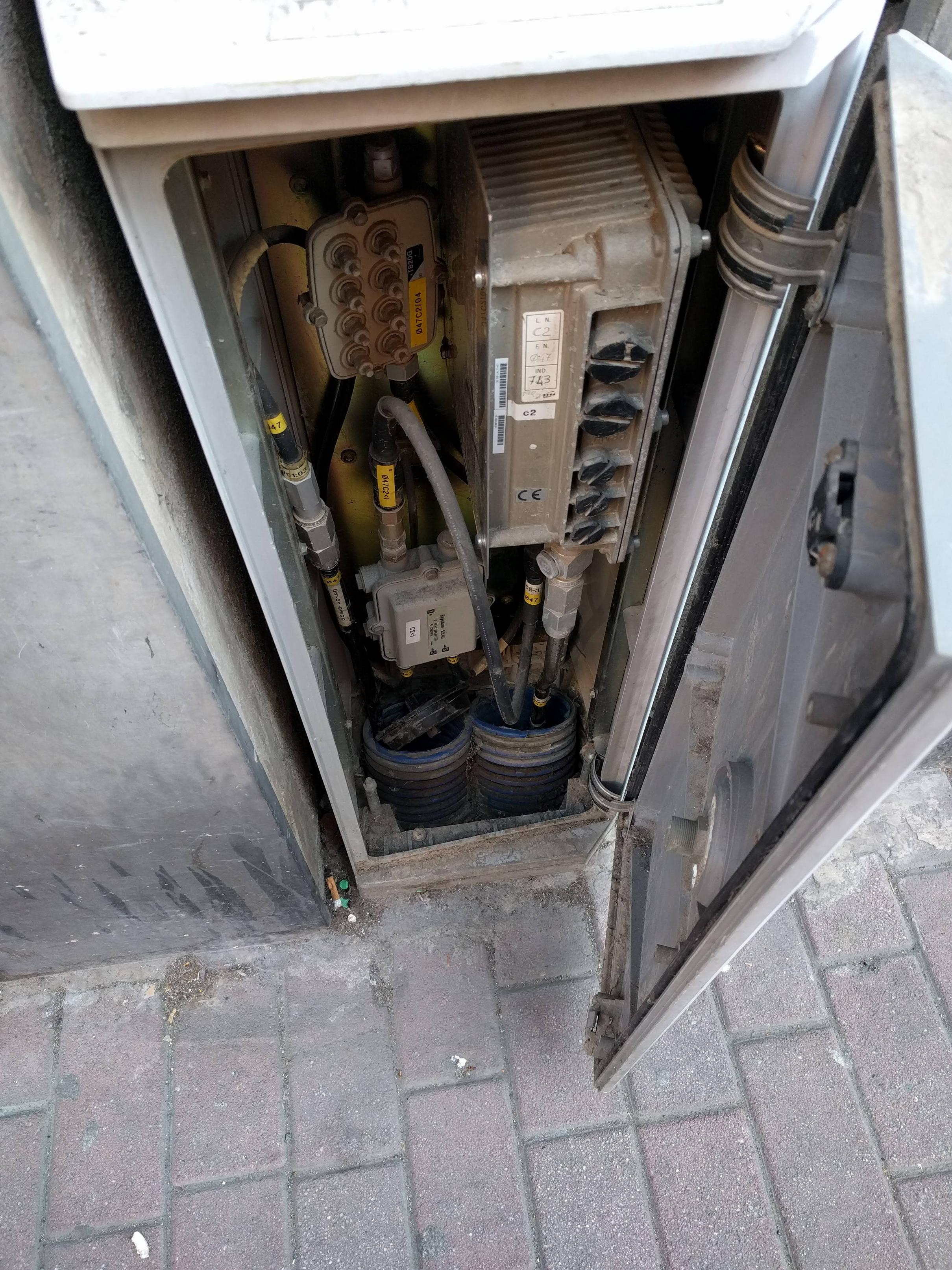 Apparato di rete del progetto SOCRATE